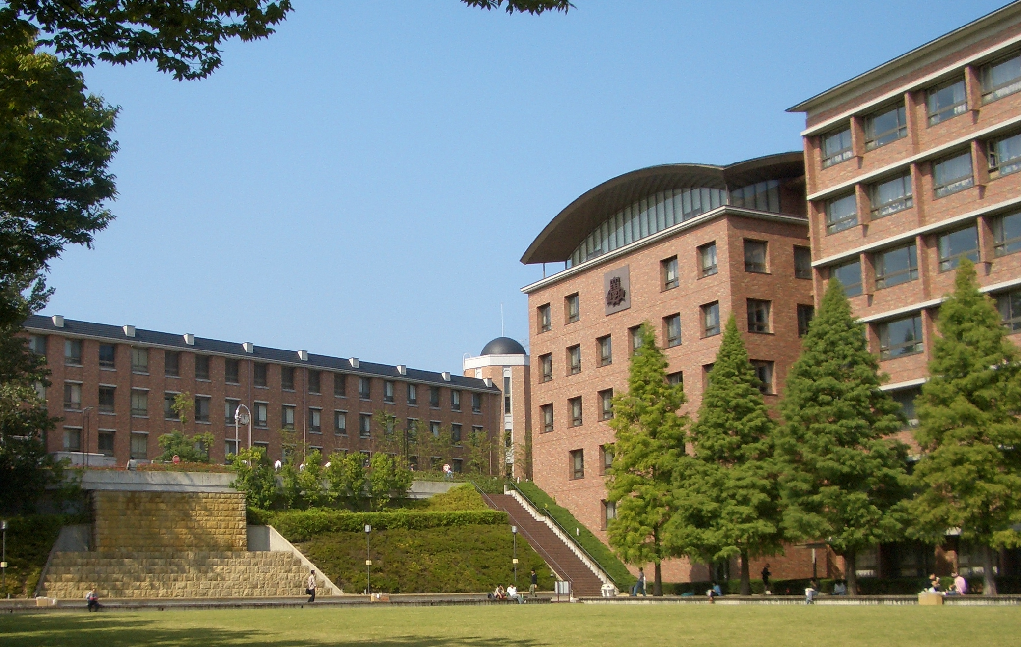 Kansai University。関西大学。